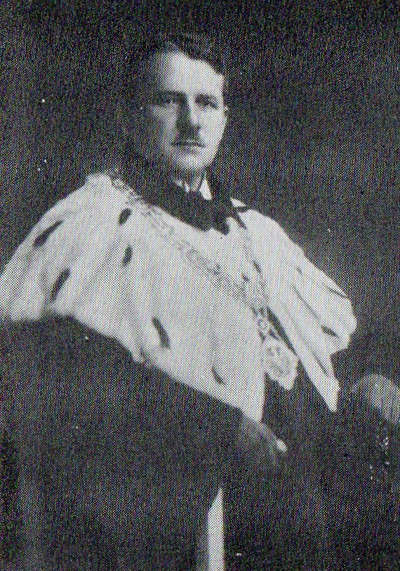 Profesur UAM.